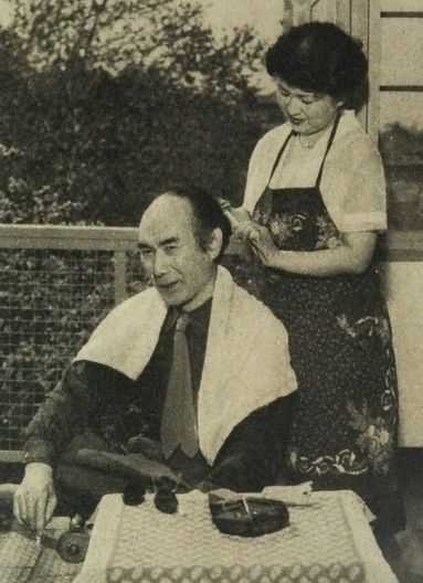 宮本三郎・文枝夫妻